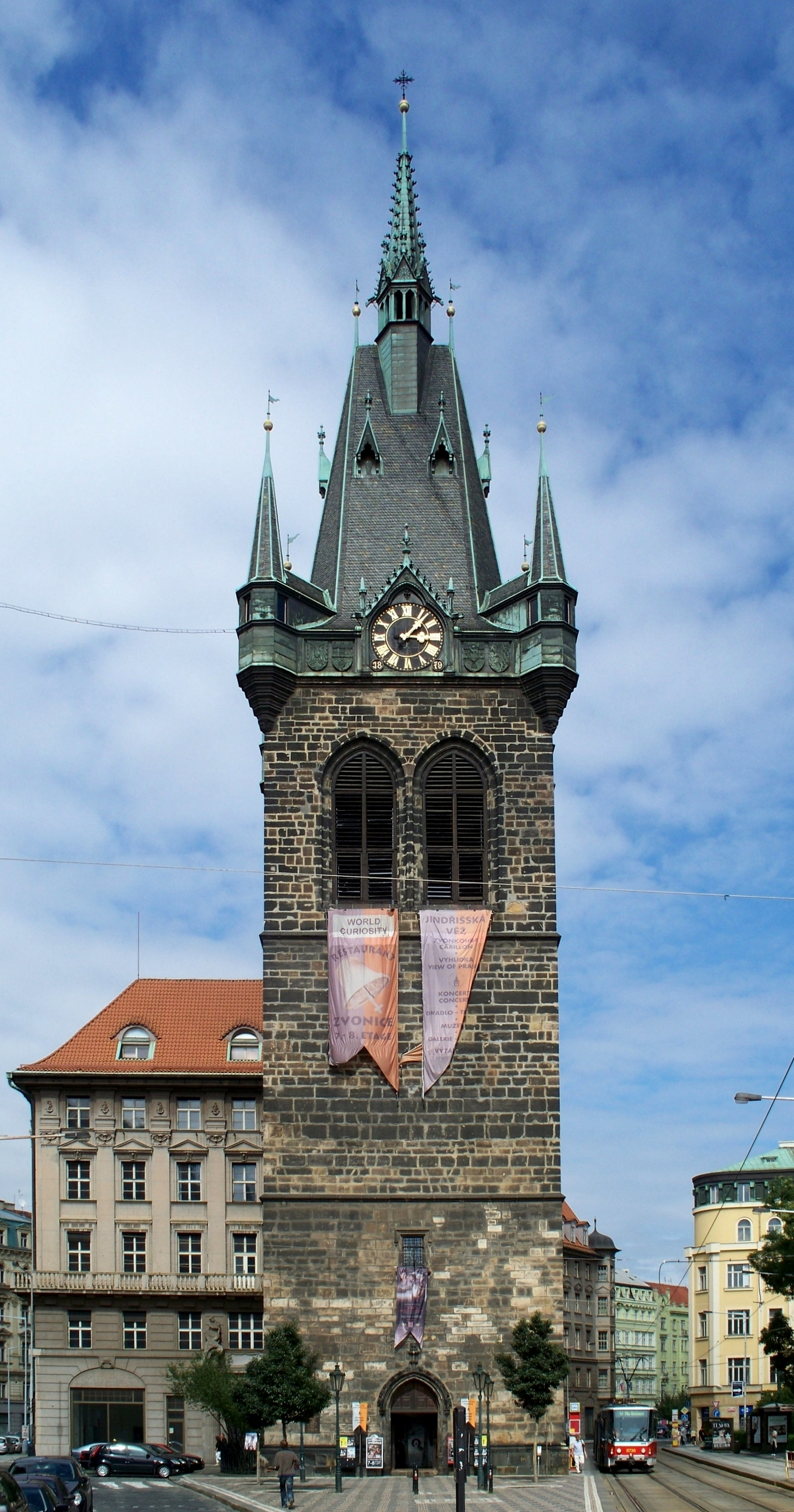 Der Heinrichsturm (Jindřišská věž) in Prag, Tschechische Republik.